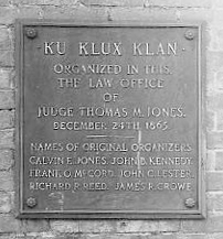 auteur : Jimmy Verhelst